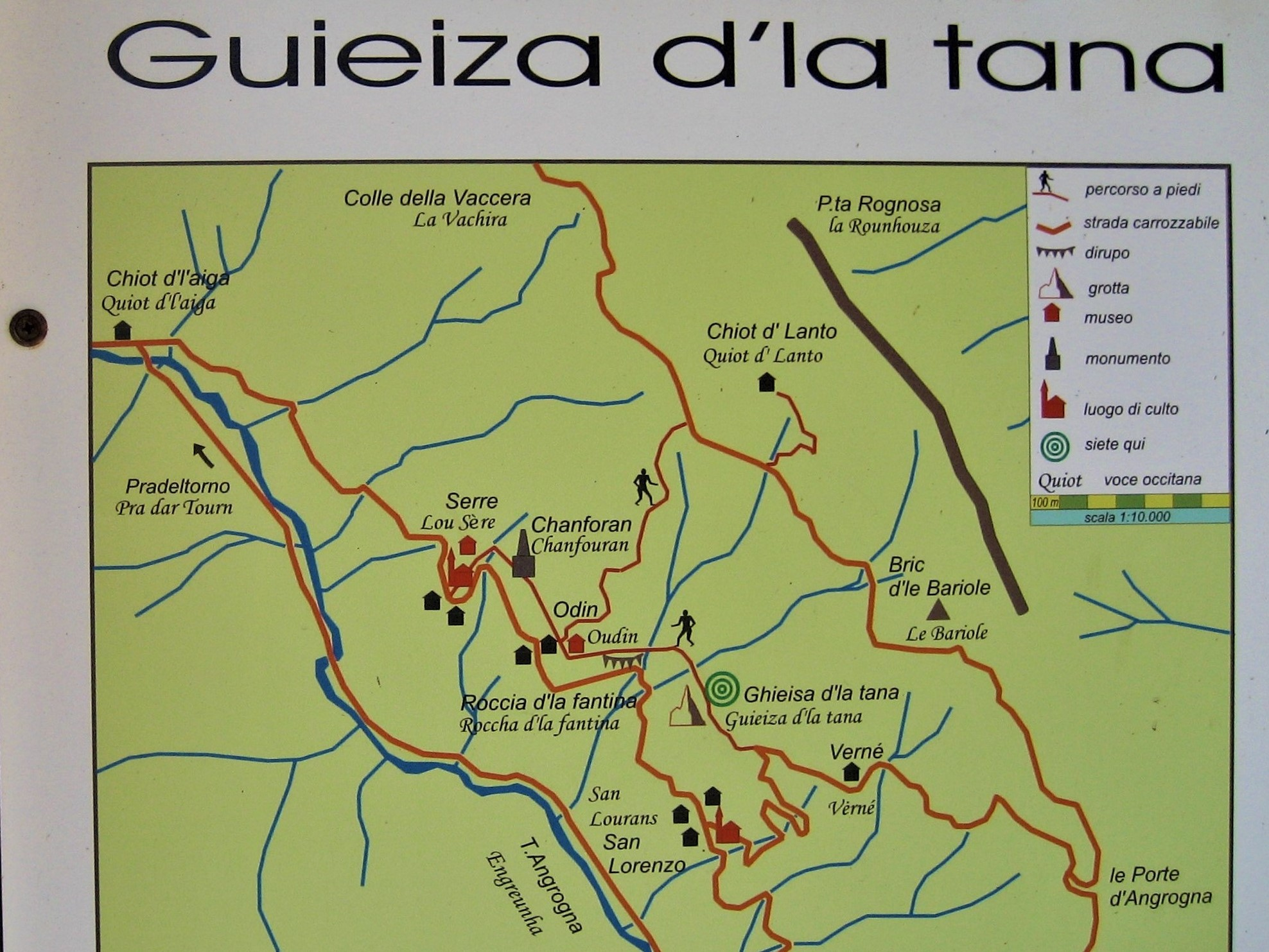 Karte